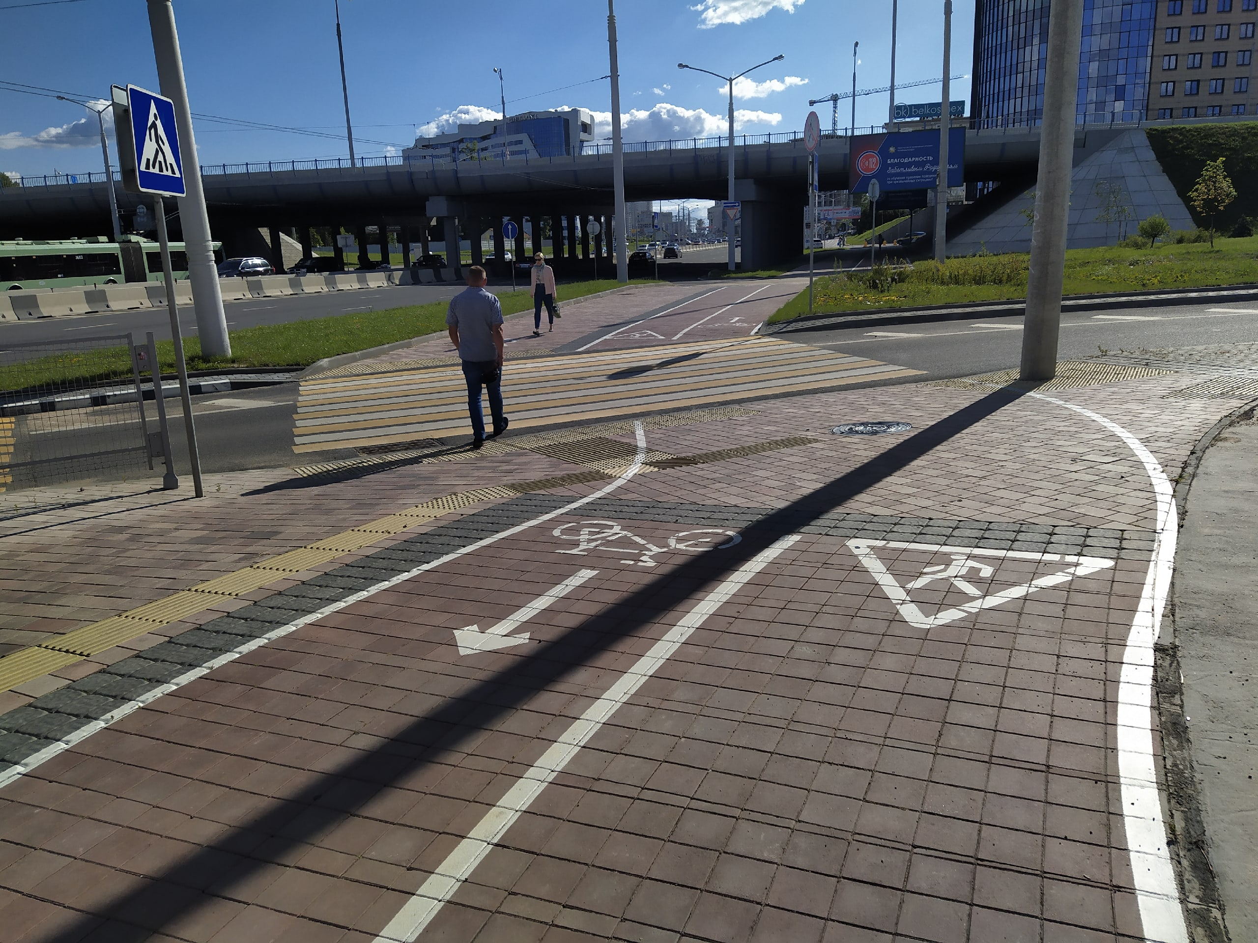 Одна из улиц Минска с совмещенной велодорожкой.